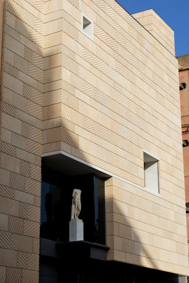 Fachada posterior del Museo del Teatro Romano de Cartagena. Obra de Rafael Moneo.